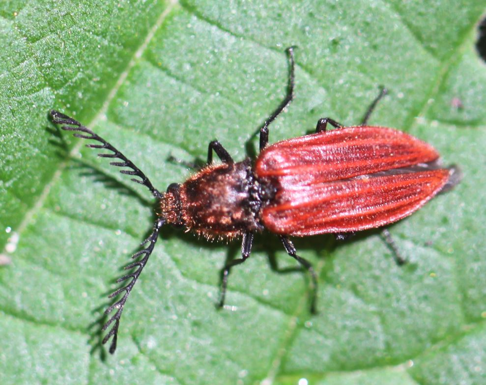 Purpurroter Schnellkäfer (Anostirus purpureus), Männchen, am 17. Mai 2020 im Waldgebiet nahe Bärenschlössle bei Stuttgart